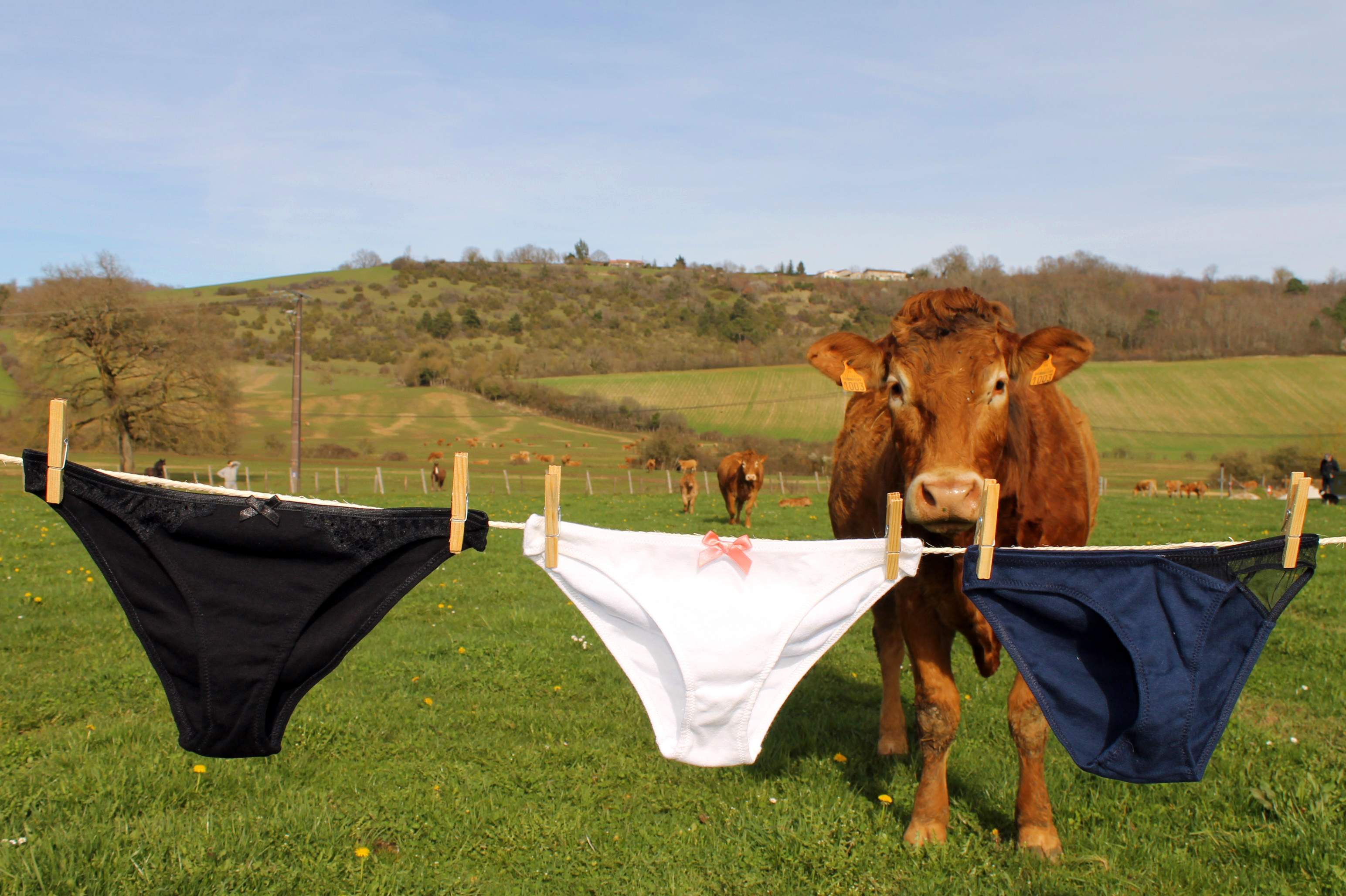 Affiche du BreakSLIP pour lancer la promotion de l'opération BreakSLIP en Dordogne et fédérer les agriculteurs du département, les collectivités et le grand public.